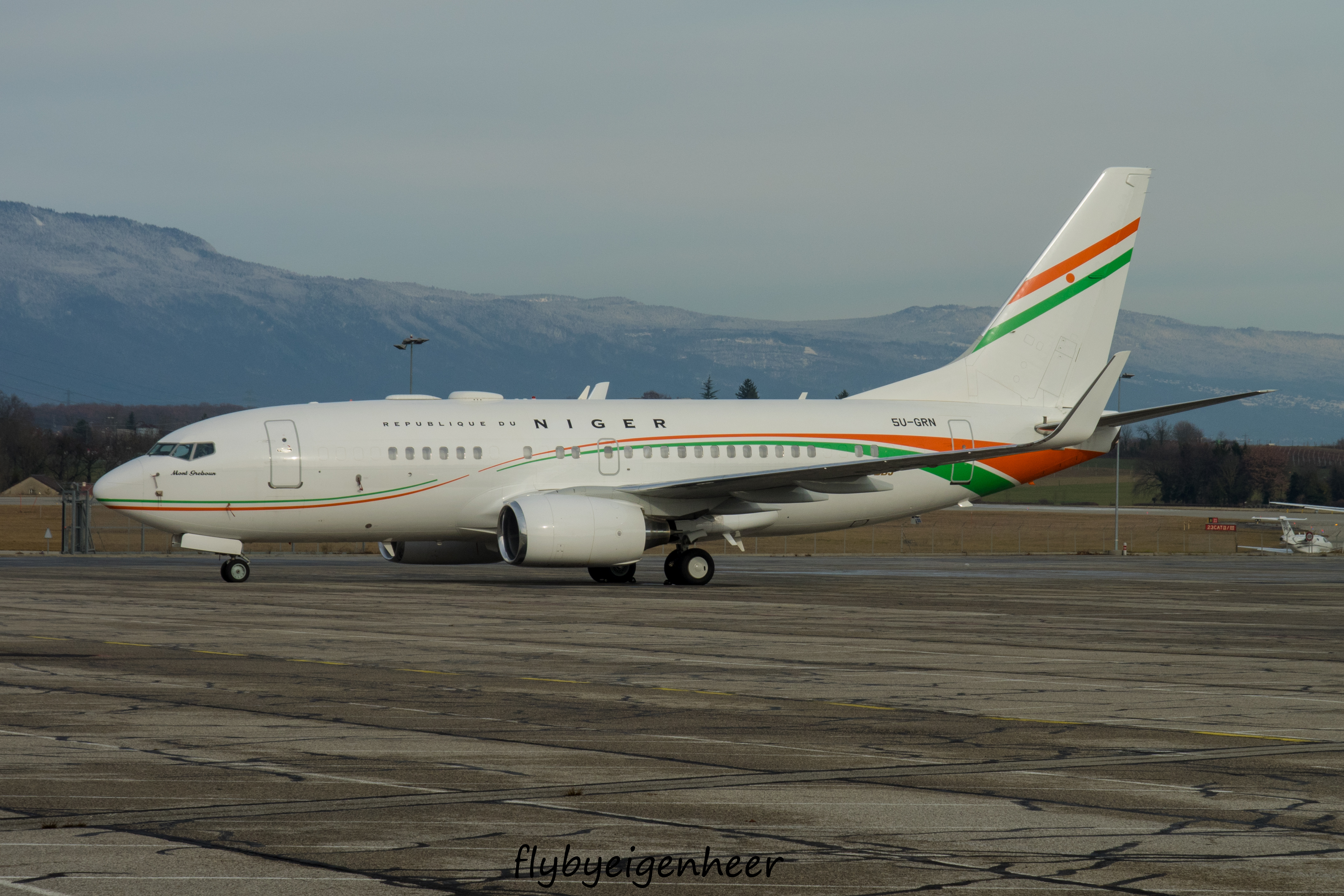 GVA P49